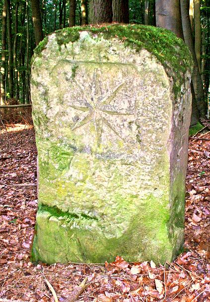 Historischer Grenzstein aus 1753 - Grenze Fürstentum Waldeck / Hessen-Darmstadt